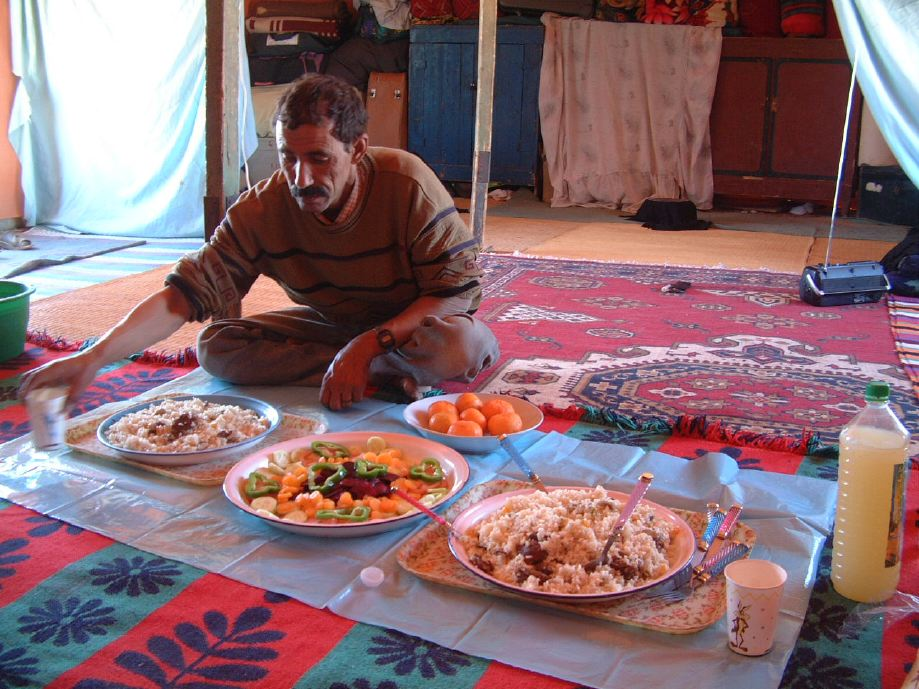 Platos tipico de la cocina Saharaui